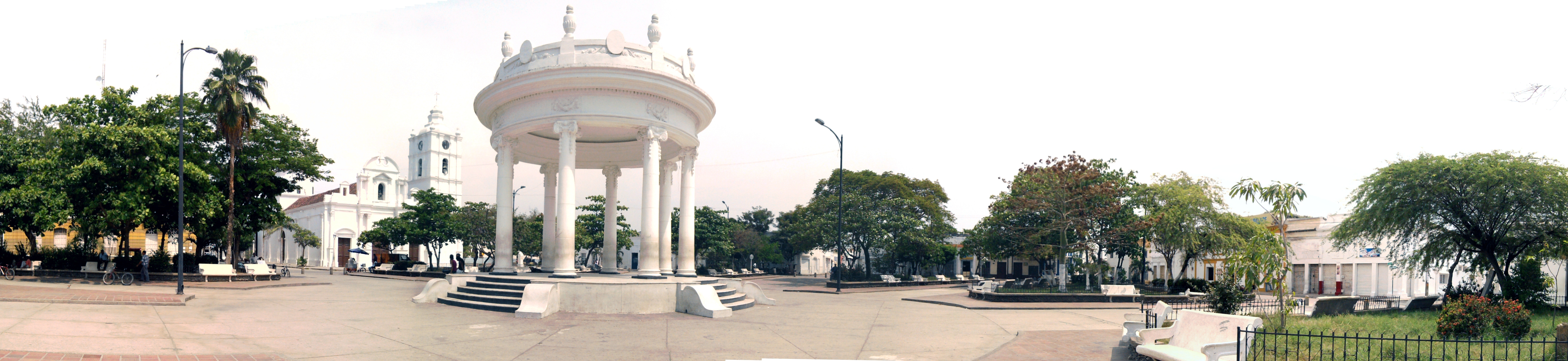 Foto del Templete de Cienaga Magdalena Colombia